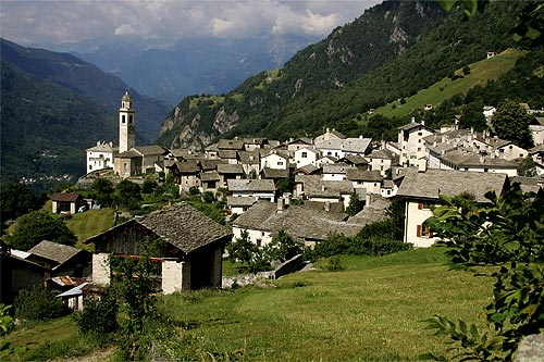 Das Dorf Soglio im Bergell, Kanton Graubünden